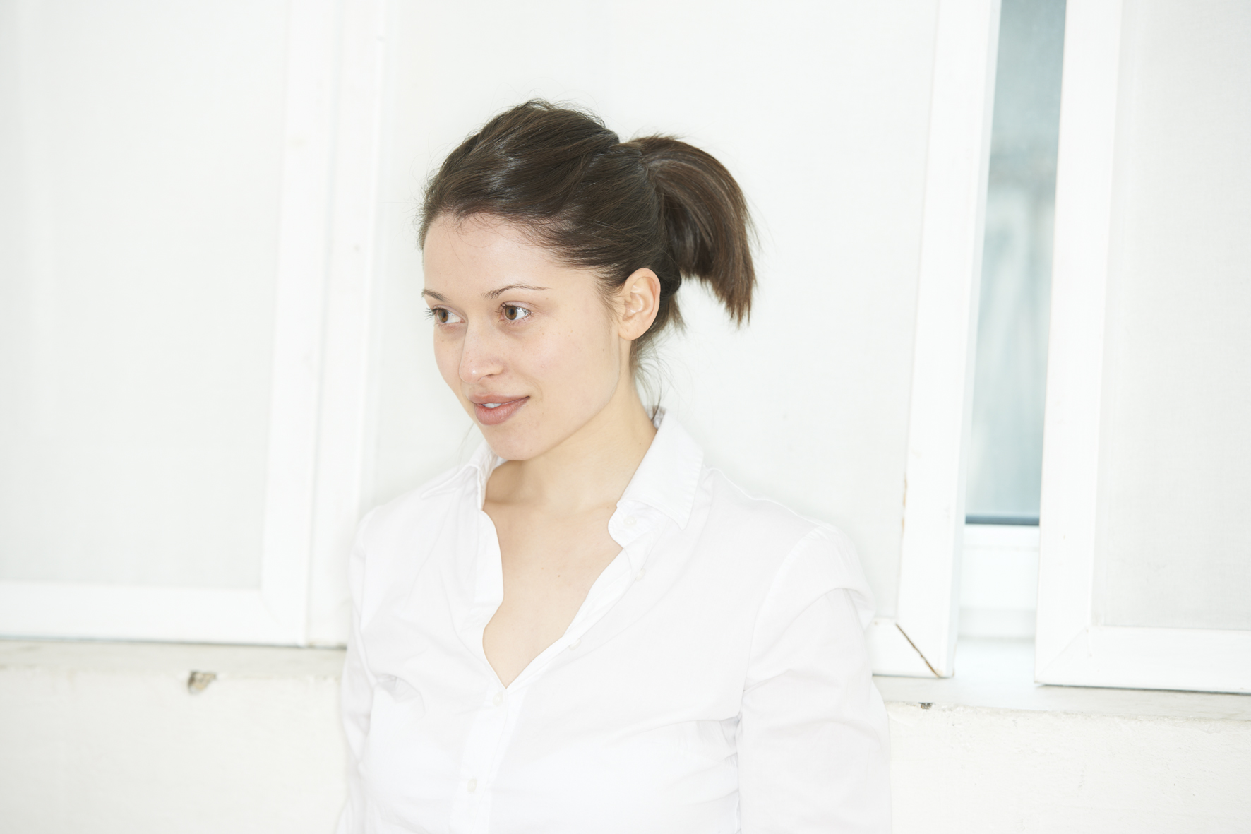 Potrait